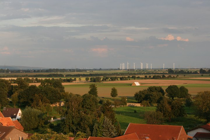 Blick über Prummern